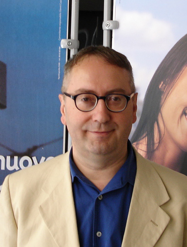 L'onorevole Franco Grillini (DS), Presidente onorario di Arcigay.